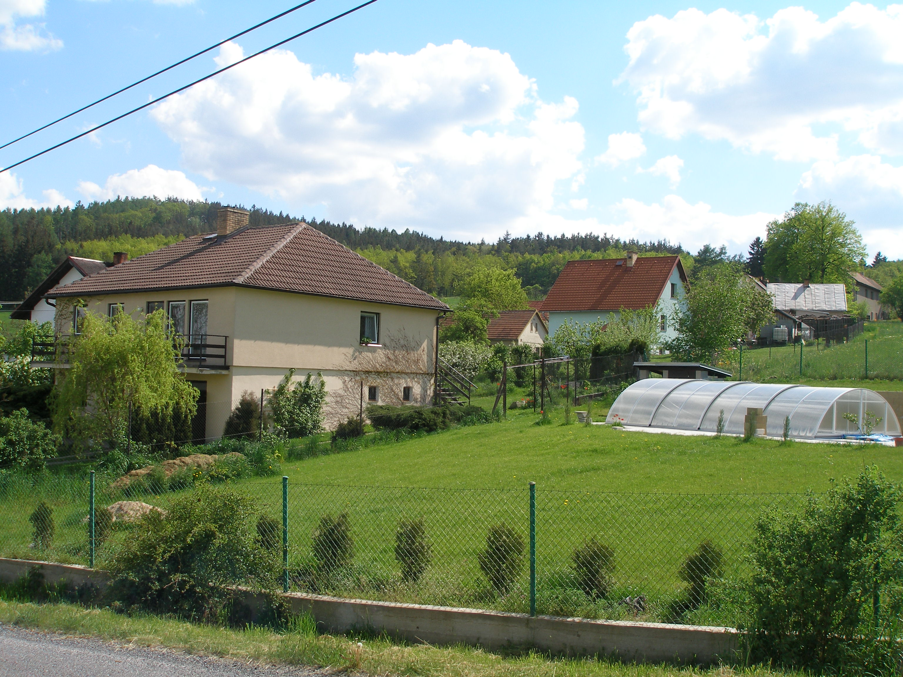 Kozí Hory - hlavní ulice dolní části vsi